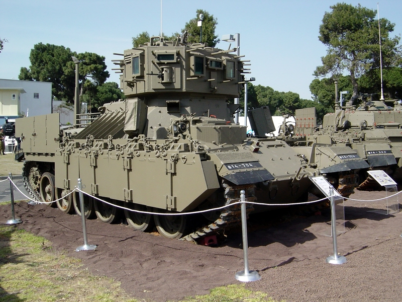 Nagmachon APC at LIC 2004 exhibition נגמחו"ן, צולם בתערוכת LIC 2004